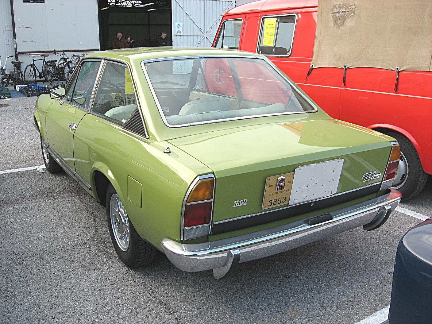 Subject